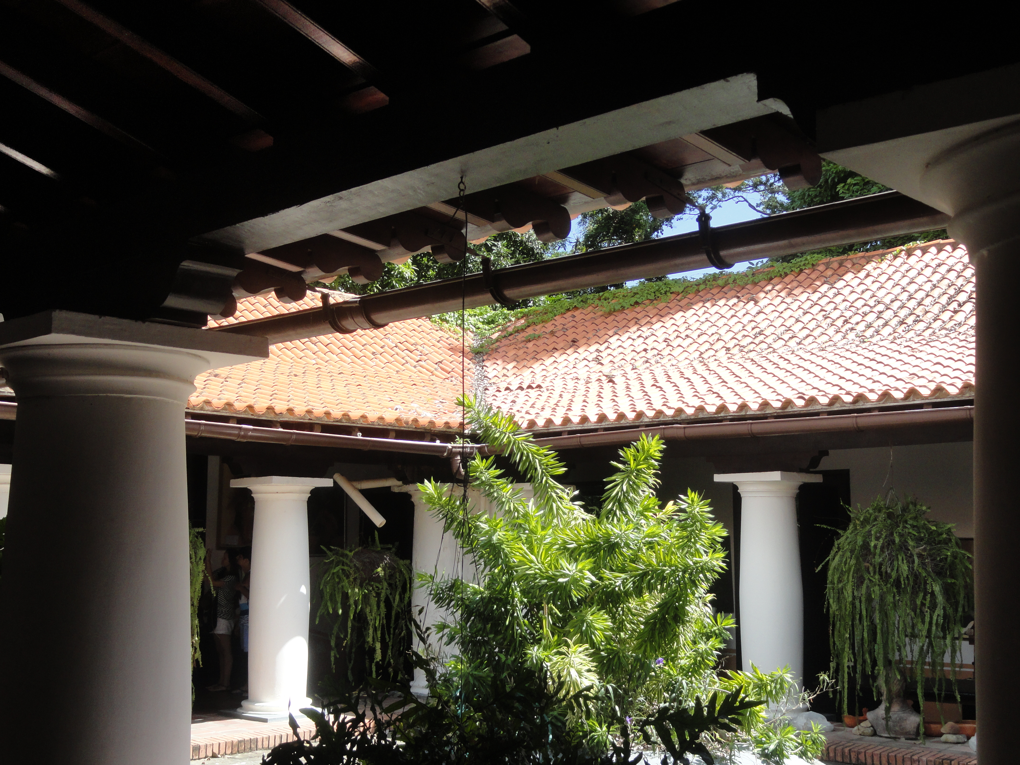 Museo general en jefe Santiago Mariño